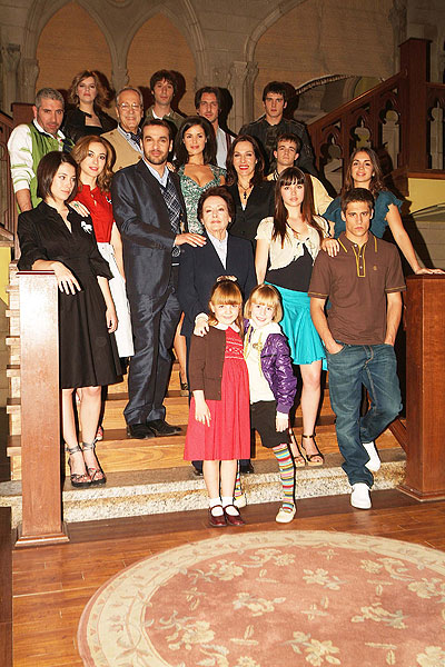 Elenco de actores de la tercera temporada.